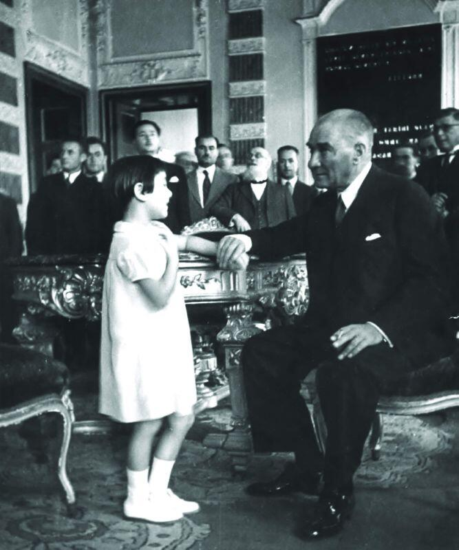 Atatürk, Türkiye’nin ilk resim ve heykel müzesi Resim ve Heykel Müzesi'nde